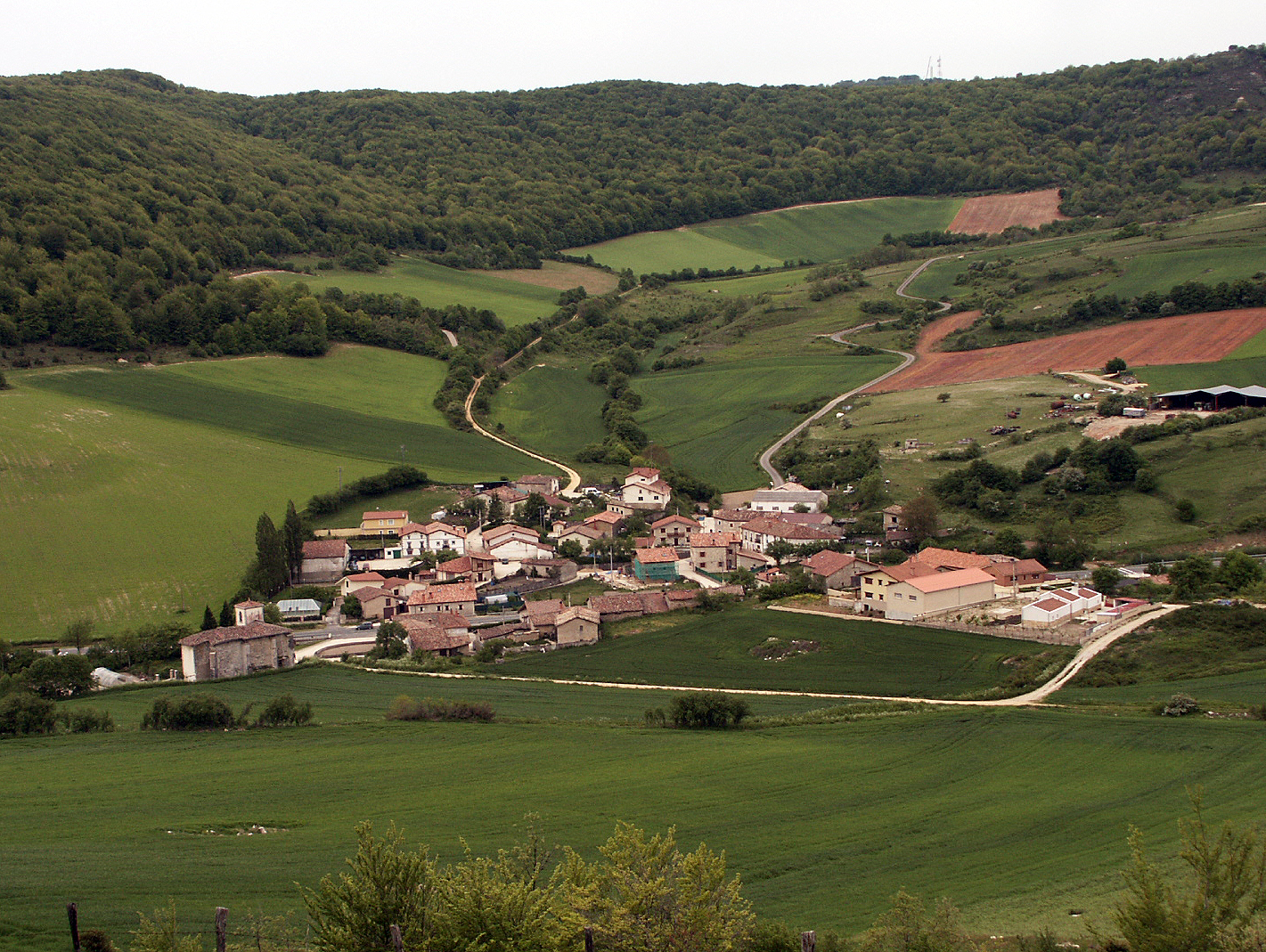 Azáceta, España